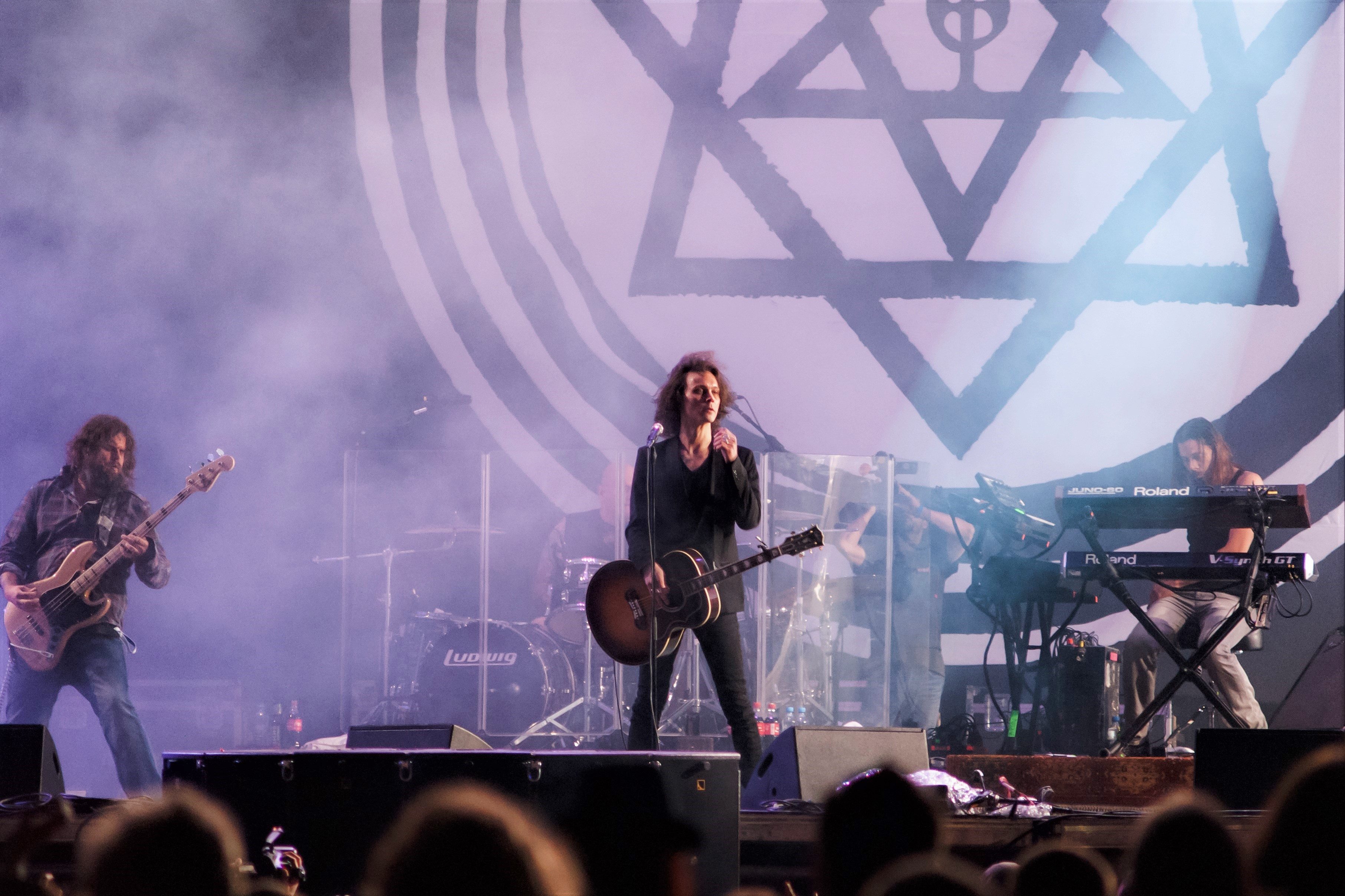 Mikko "Migé" Paananen, Ville Valo i Janne "Burton" Puurtinen podczas festiwalu Ursynalia 2013